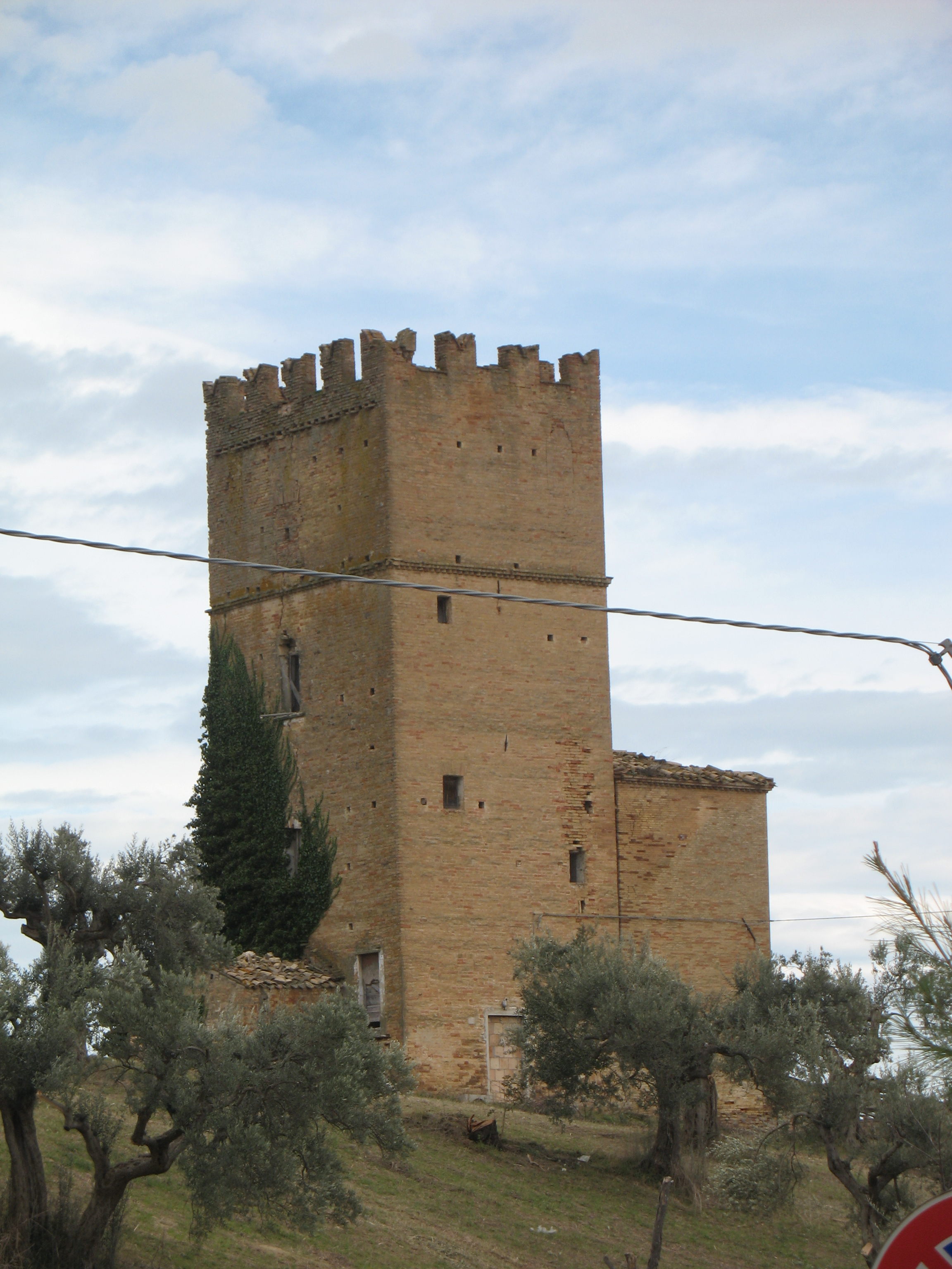 La torre dell’antica famiglia teatina Anelli-Fieramosca costruita in laterizio